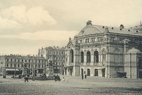 Оперный театр в Киеве, ок. 1900